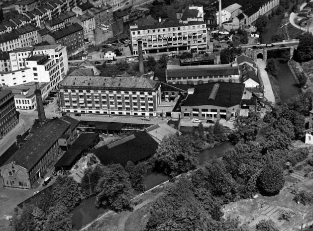 Darres gate, Hauchs gate, Waldemar Thranes gate, Sannerbrua, Akerselva, Foss skole, industri (Flyfoto).